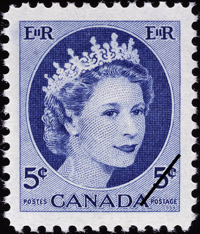 Timbre-poste Canada 5 cents Elizabeth II Wilding